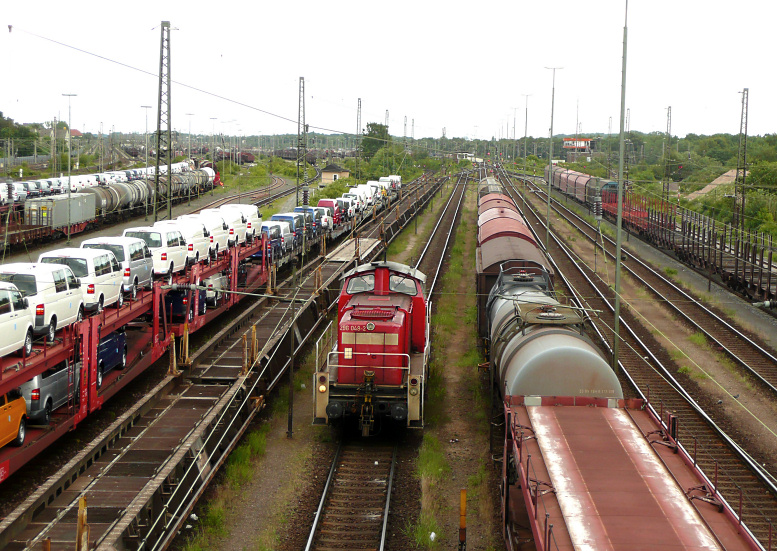 Rangierbahnhof Seelze